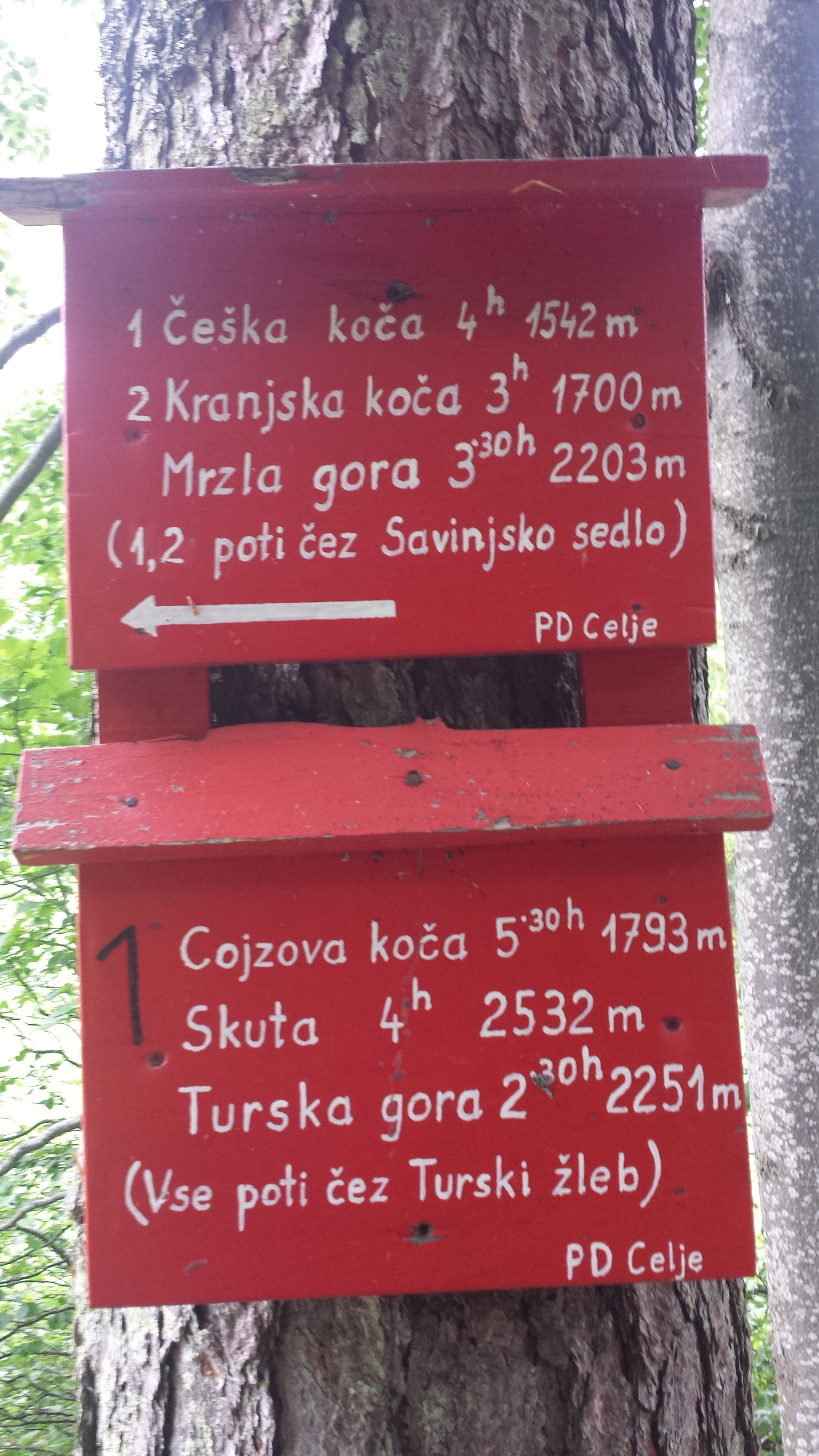 Okrešelj, Smerokazi pri koči